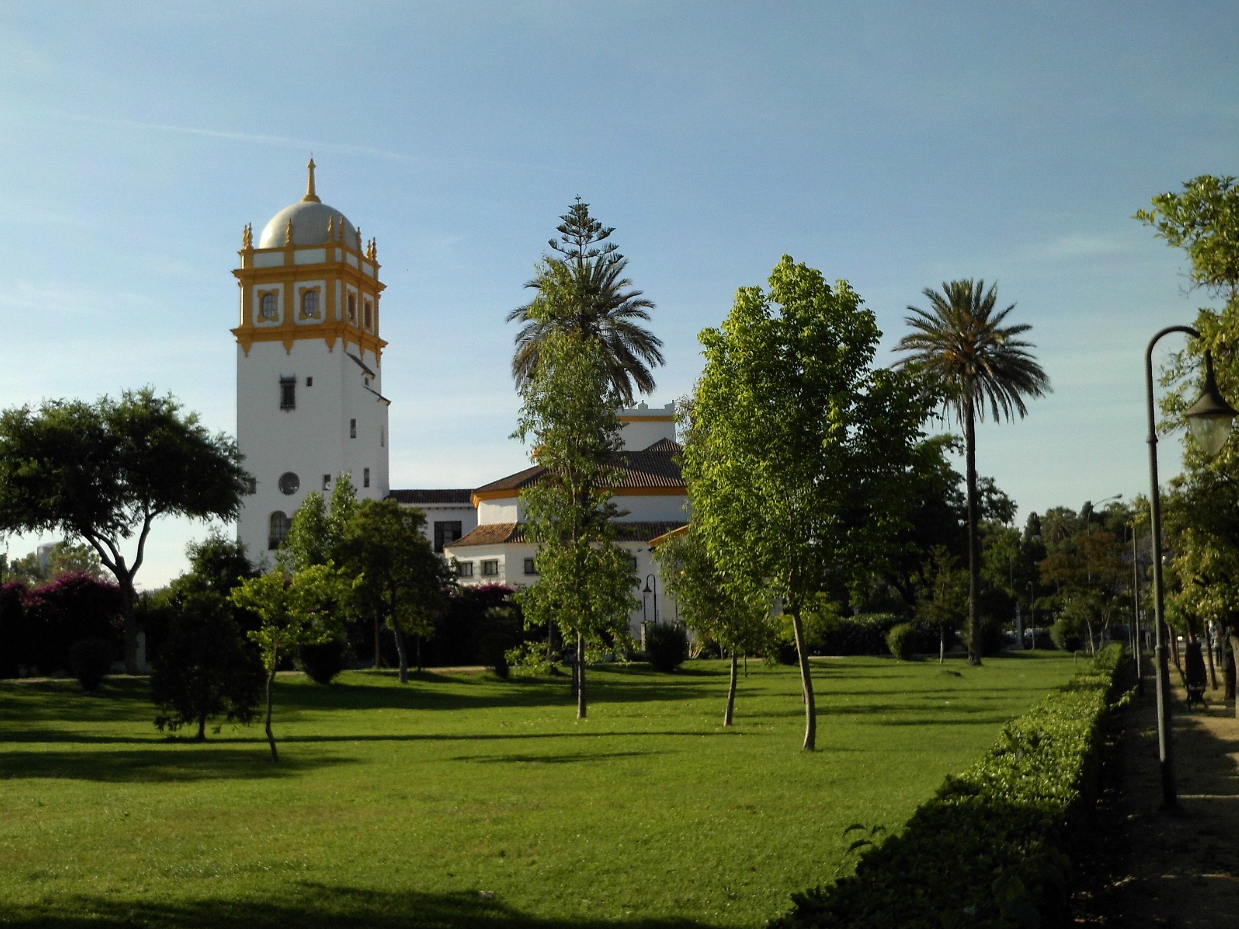 Pabellón de Argentina desde los Jardines de las Delicias. Sevilla.